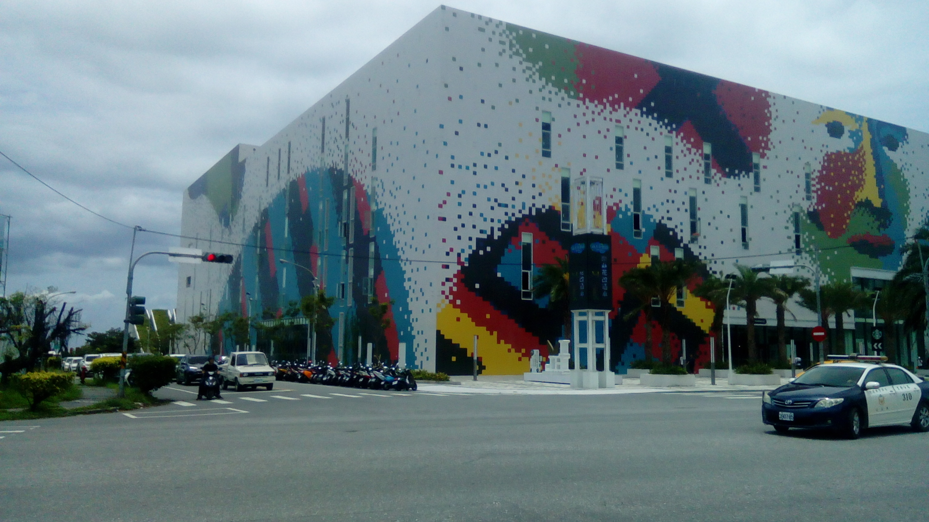 花蓮縣吉安鄉光華三村 台193縣道吉安路段 台開新天堂樂園第一期